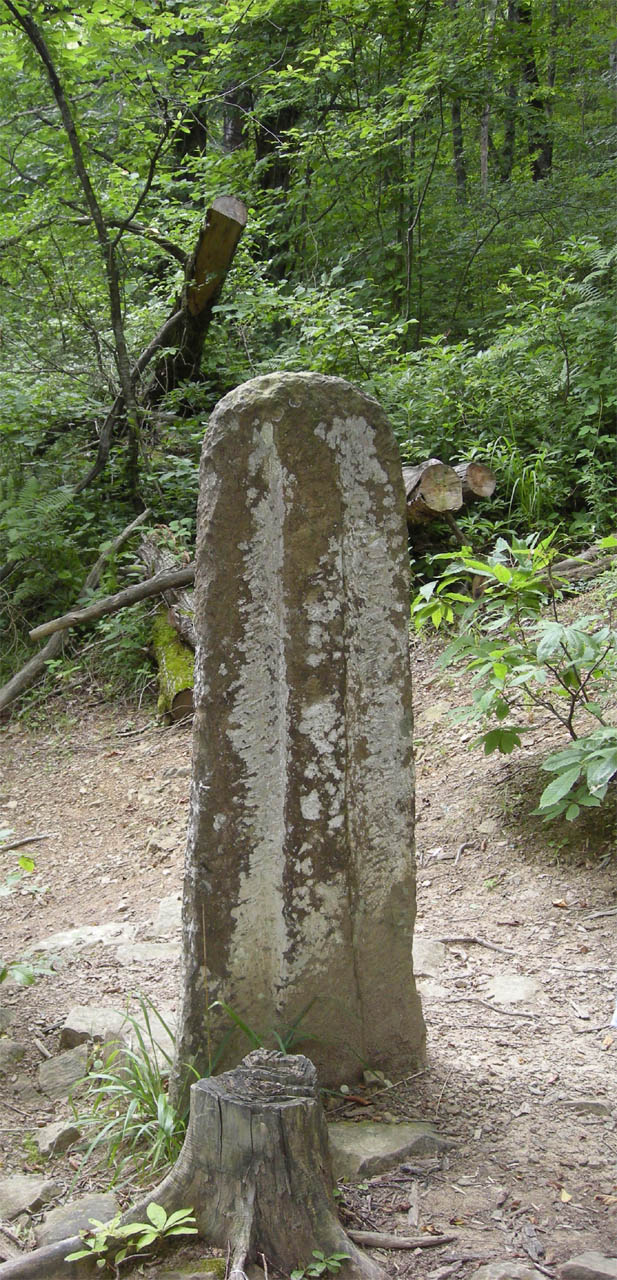 Единственный достоверно описанный менгир Западного Кавказа: на дольменной группе долины реки Аше. Имеет уплощенную форму с выпуклым фаллическим рельефом, одинаковым с обоих сторон, высота около полутора метров.